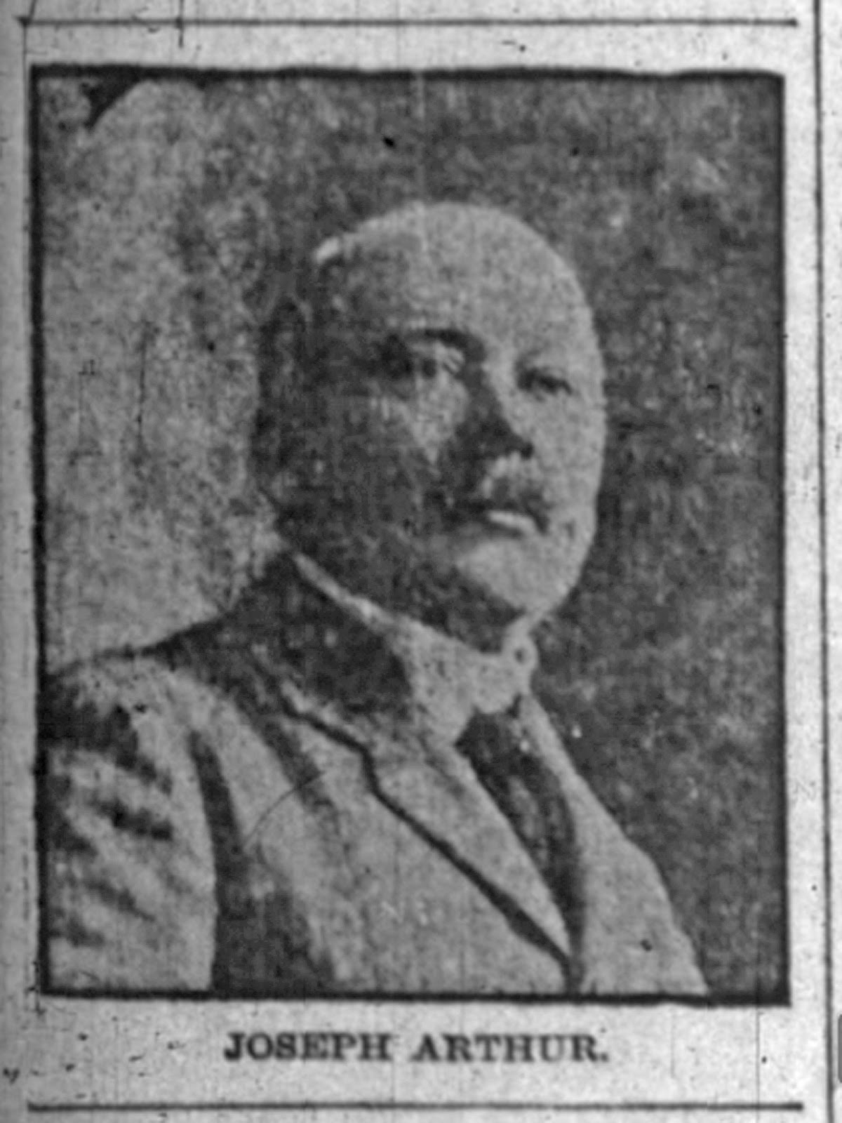 Joseph Arthur en 1900. Photographie parue dans The Indianapolis News le 9 juin 1900.